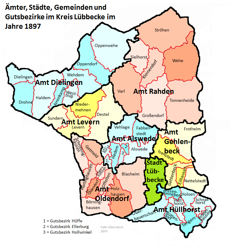 Ämter und Gemeinden im Kreis Lübbecke 1897